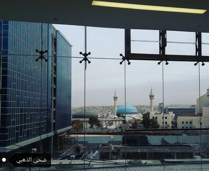 العبدلي مول